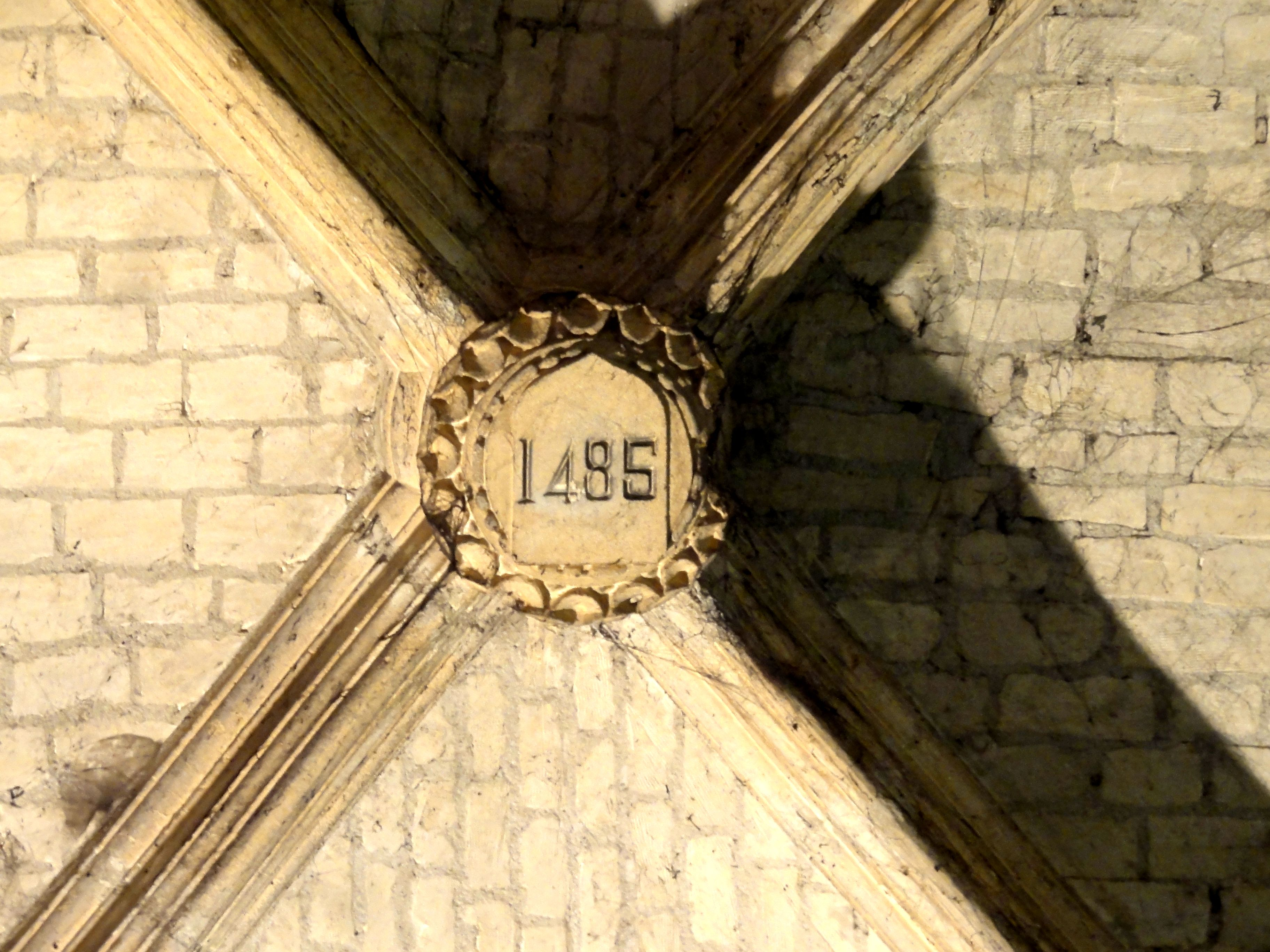 Clé de voûte de la 4e (?) travée du collatéral.